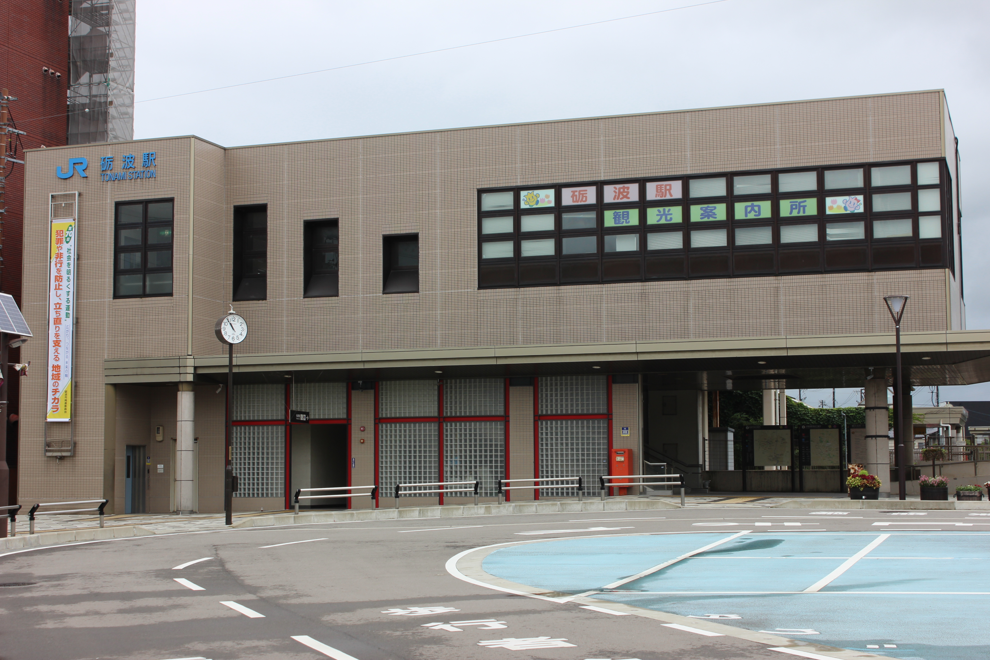 砺波駅（北口） Canon EOS Kiss X5